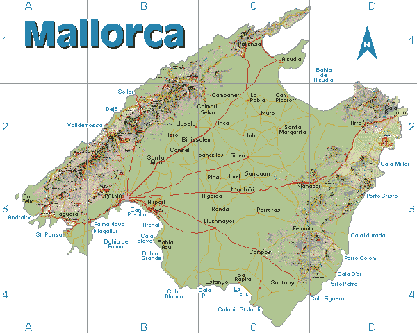 Landkarte Mallorca, Quelle: Ministerio de Medio Ambiente Genehmigung für Artikel-Serie Mallorca in Wiki liegt vor einige Kartendetails wurden geändert